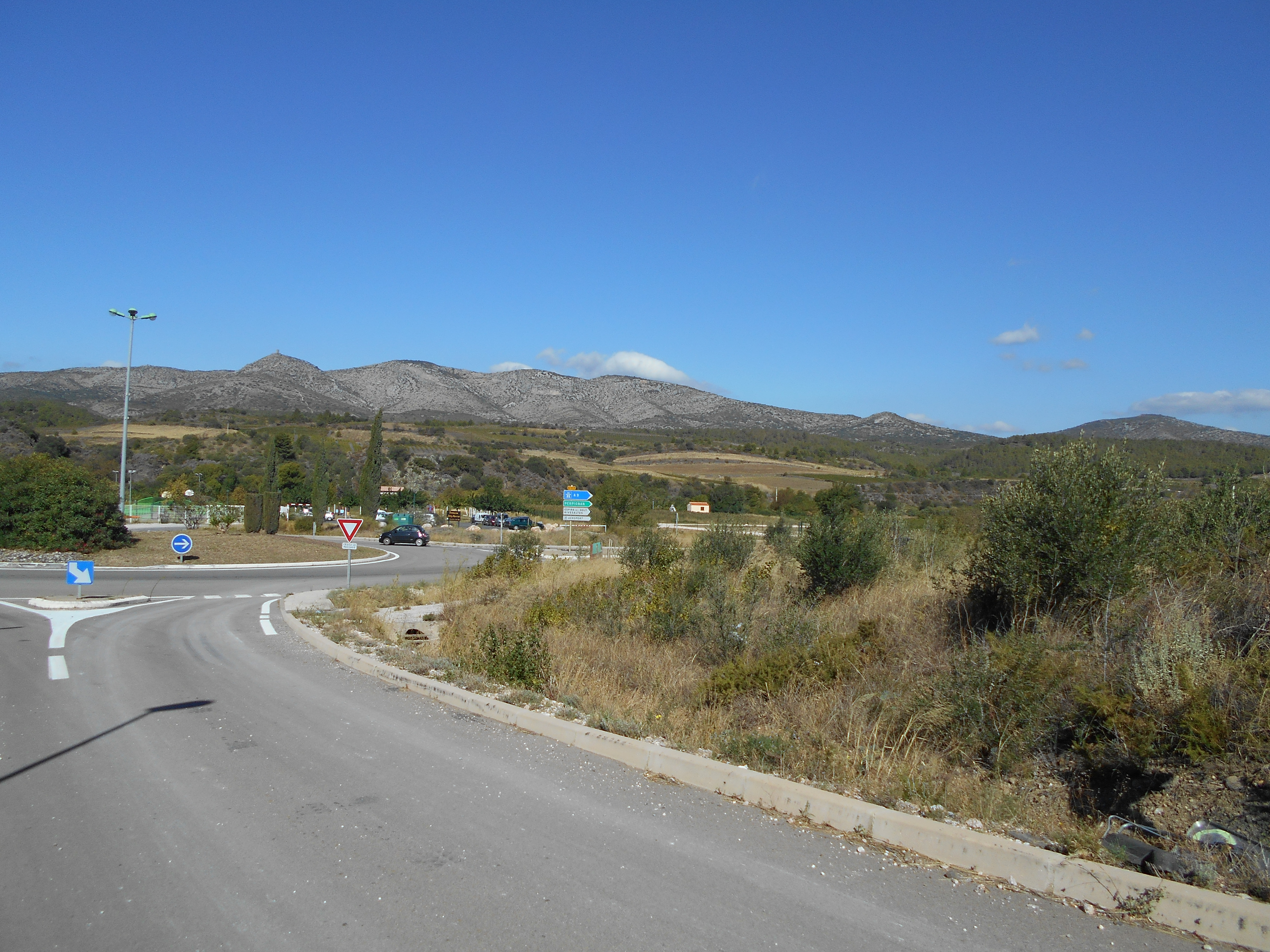 La Serra de Talteüll des de Cases de Pena